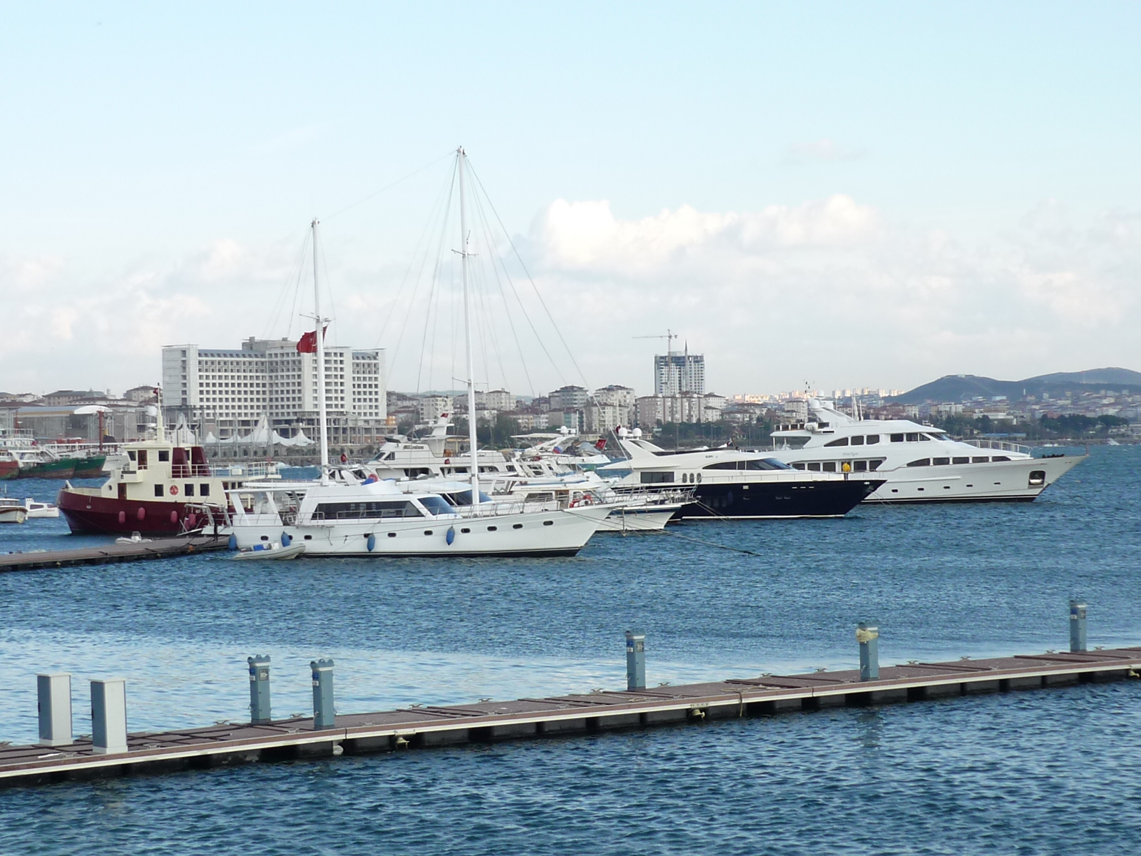 Kaynarca shores in Istanbul, Turkey (Kaynarca sahilinden çektiğim bir fotodur.)